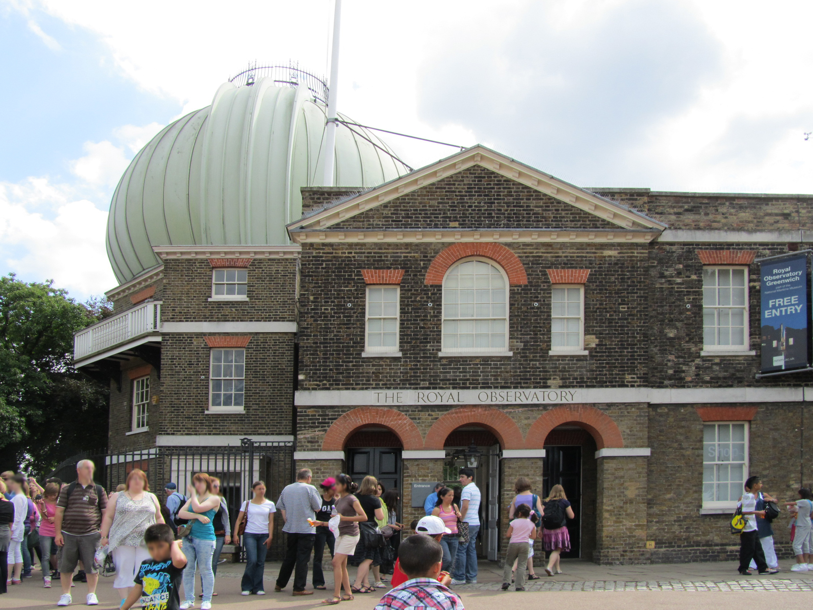 Royal Observatory, Greenwich